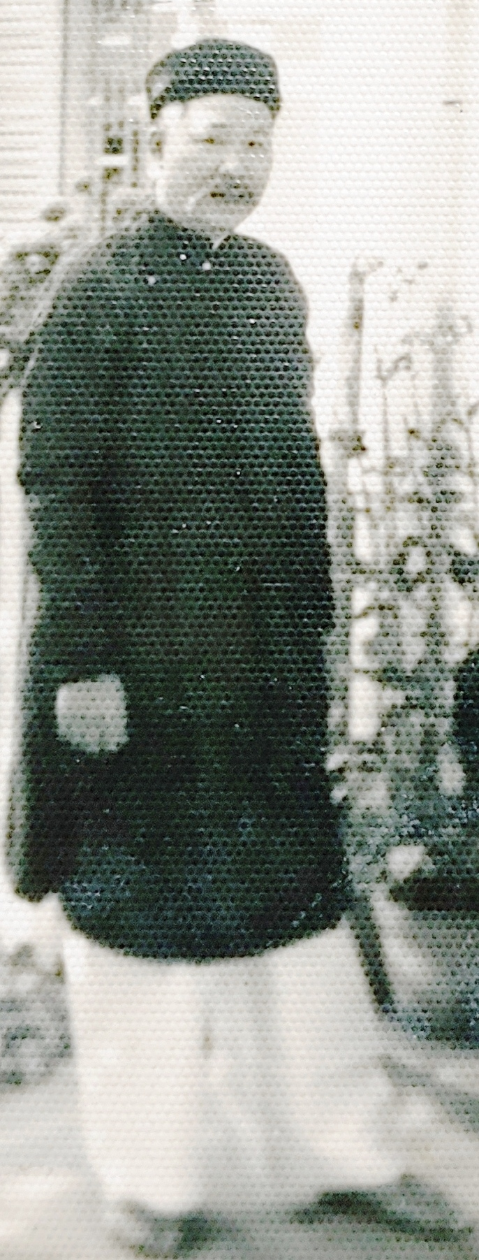 Áo dài & khăn đóng2